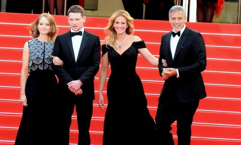 Présentation de "Money Monster" au festival de Cannes